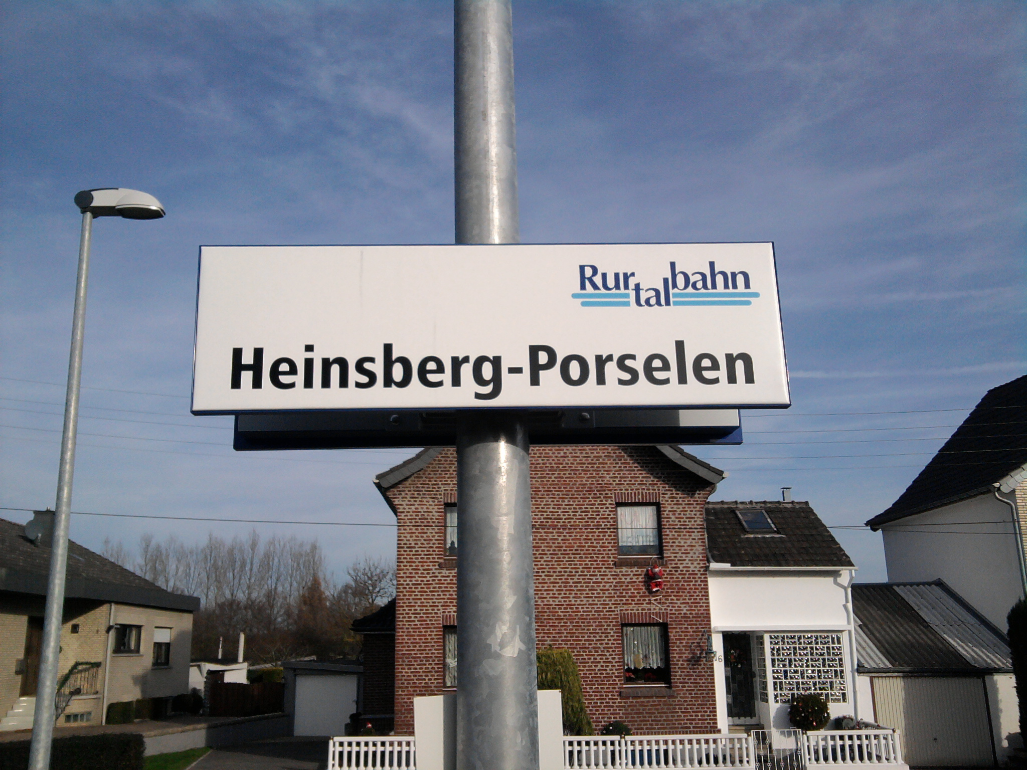 Haltestelle der Rurtalbahn GmbH auf der Strecke der Wurmtalbahn (Heinsberg-Lindern) in der Ortschaft Porselen